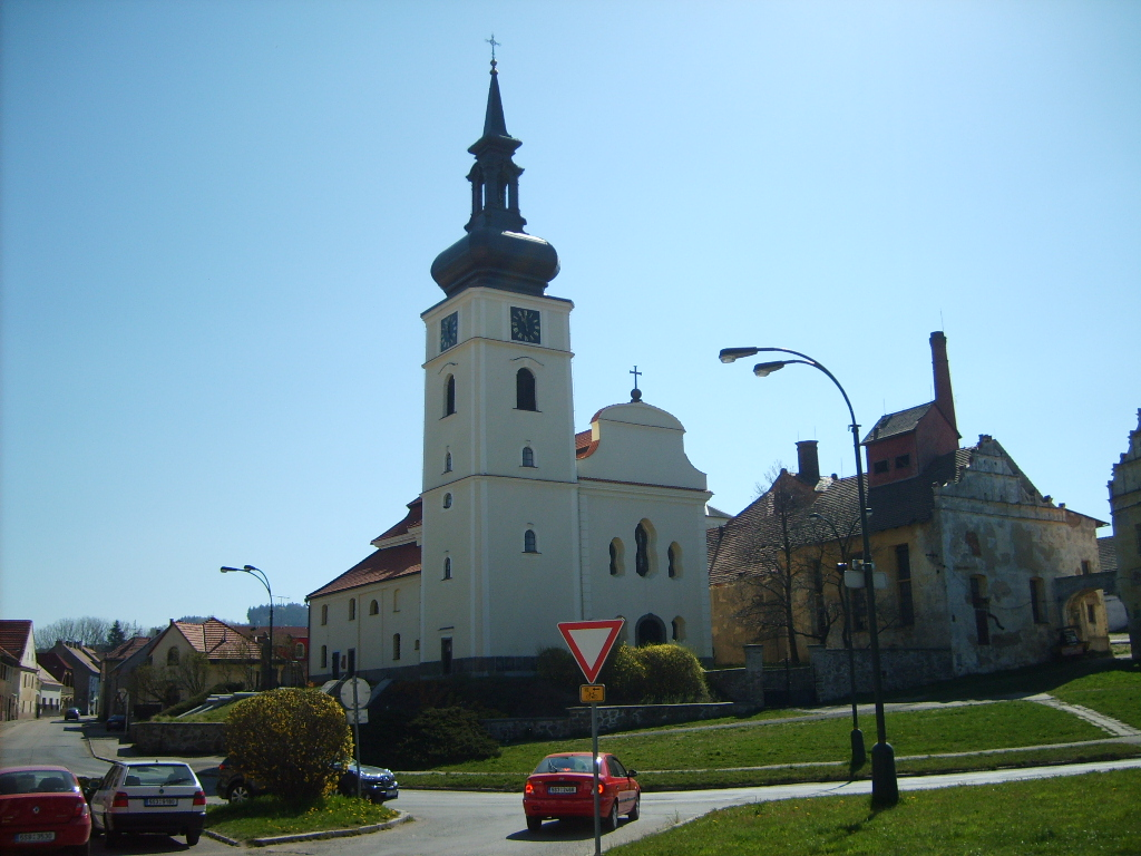 Farní kostel sv. Václava ve Voticích (BN).